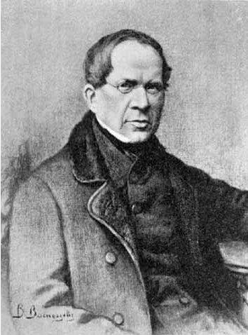 Pyotr_Vyazemsky